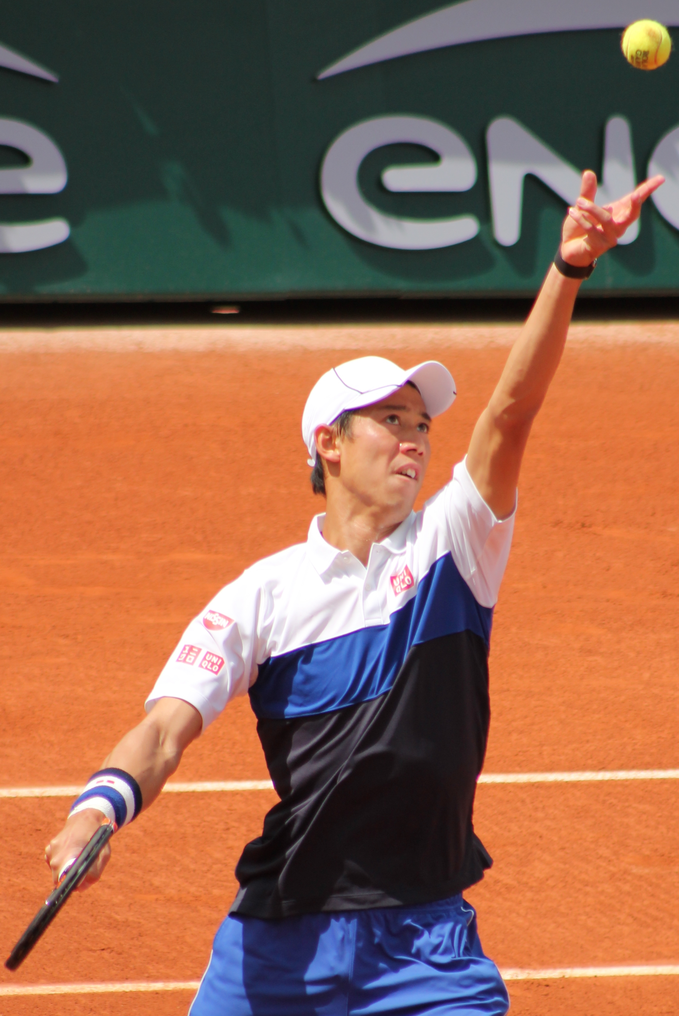 Nishikori RG15 (26)